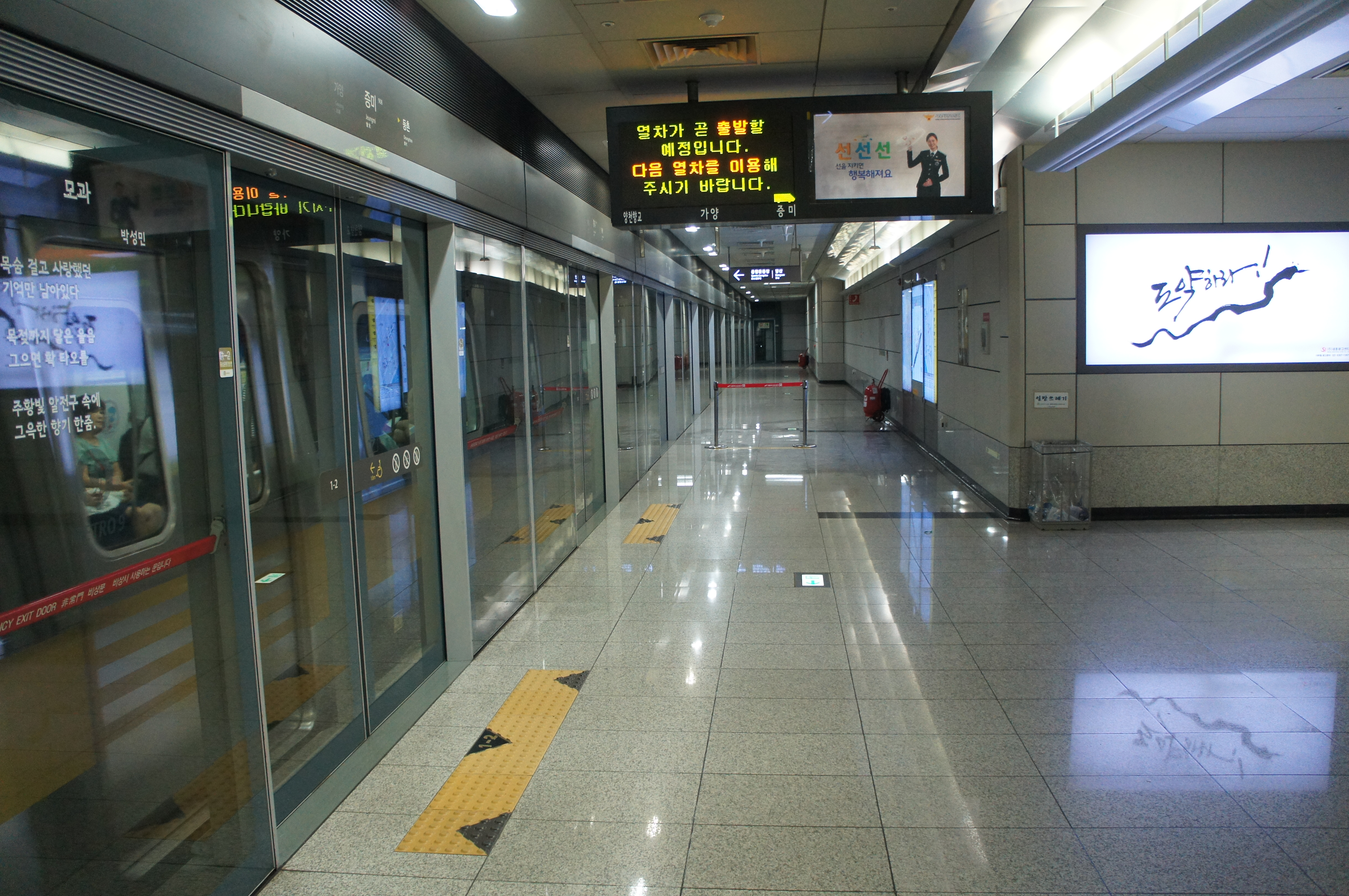 증미역 승강장